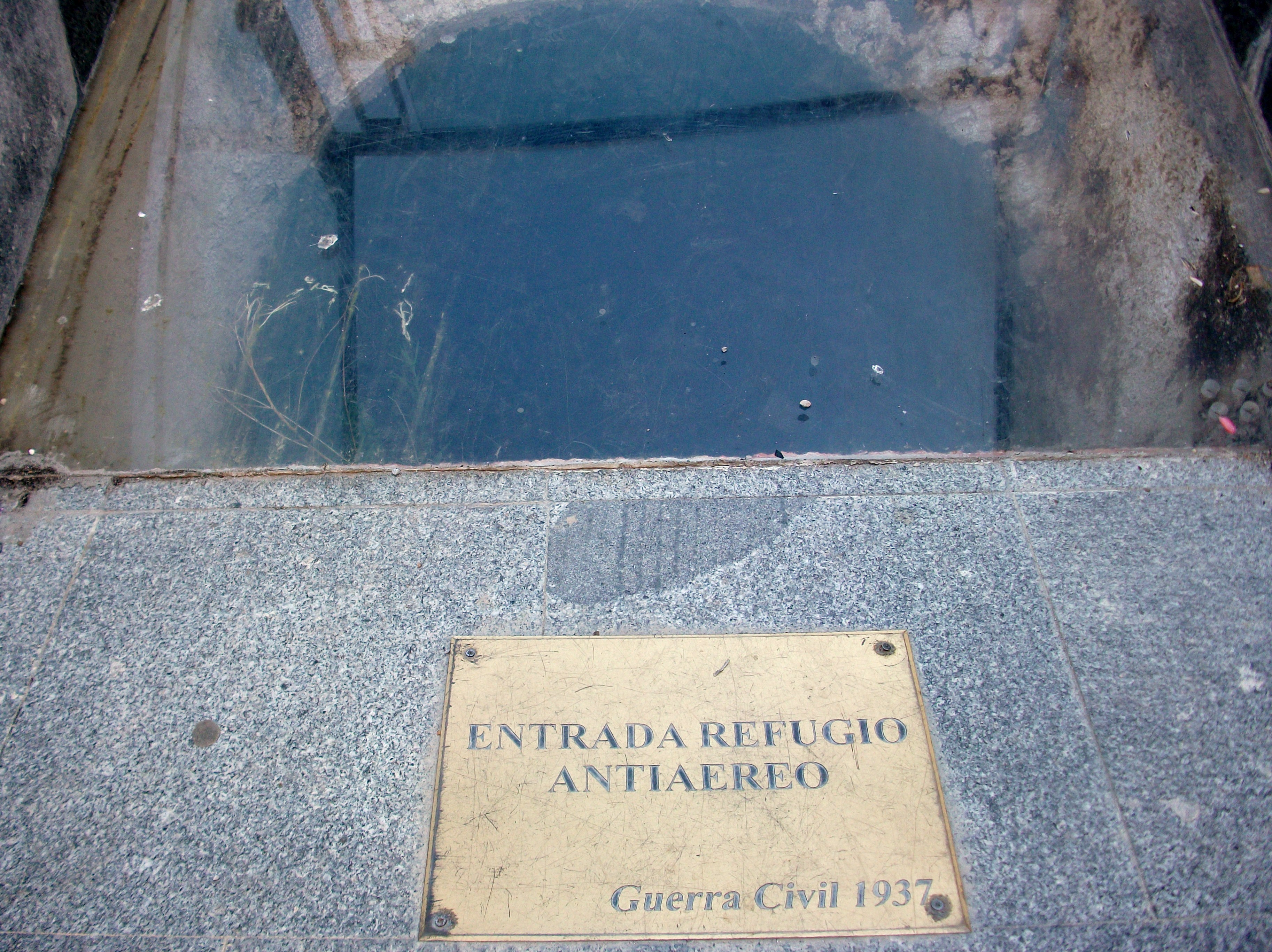 Entrada Refugio Antiaéreo, Guerra Civil 1937